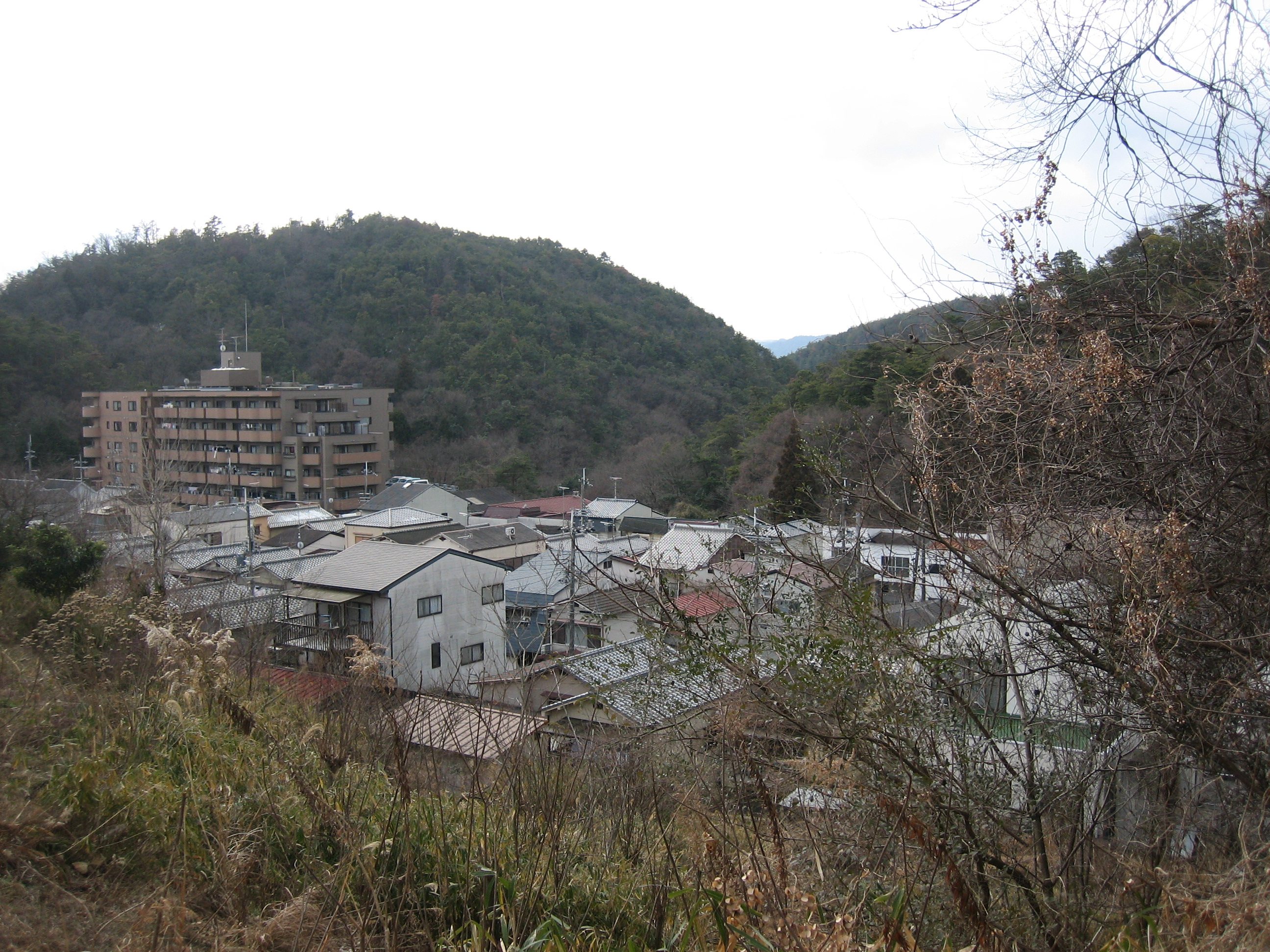 京都市北区大北山原谷乾町から撮影